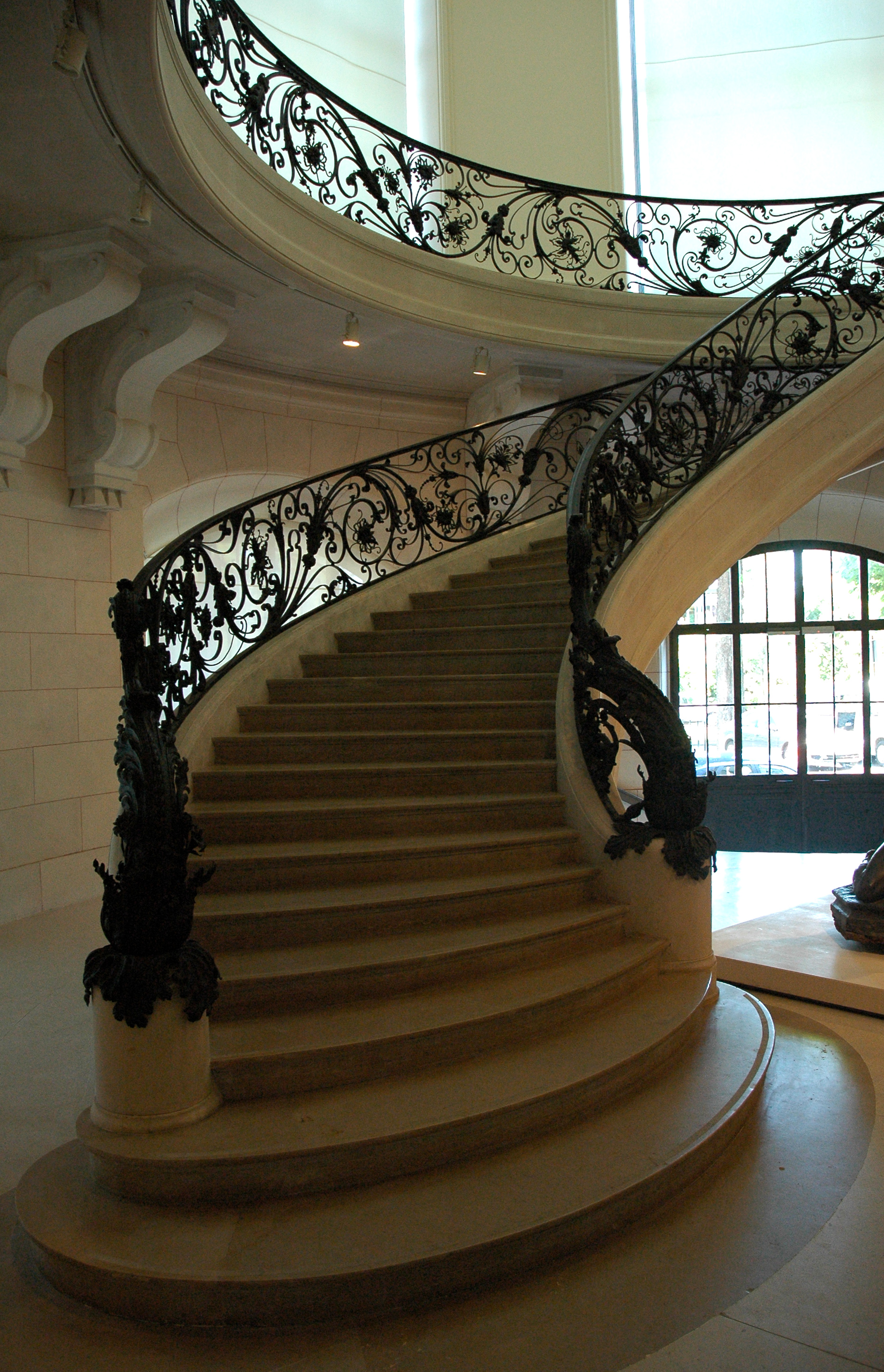 France Paris Petit Palais Escalier intérieur en 2006